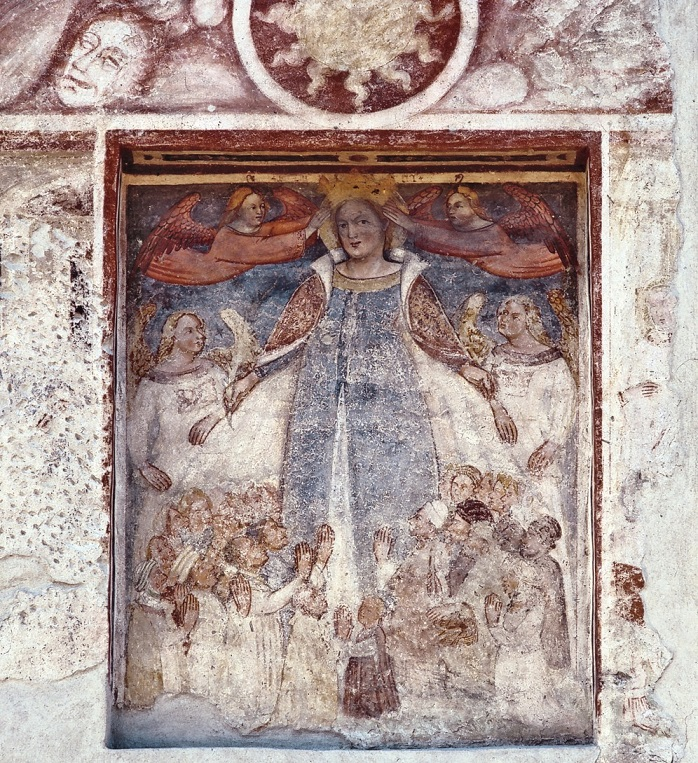 Madonna della Misericordia, affresco, via Mantica 6, Udine